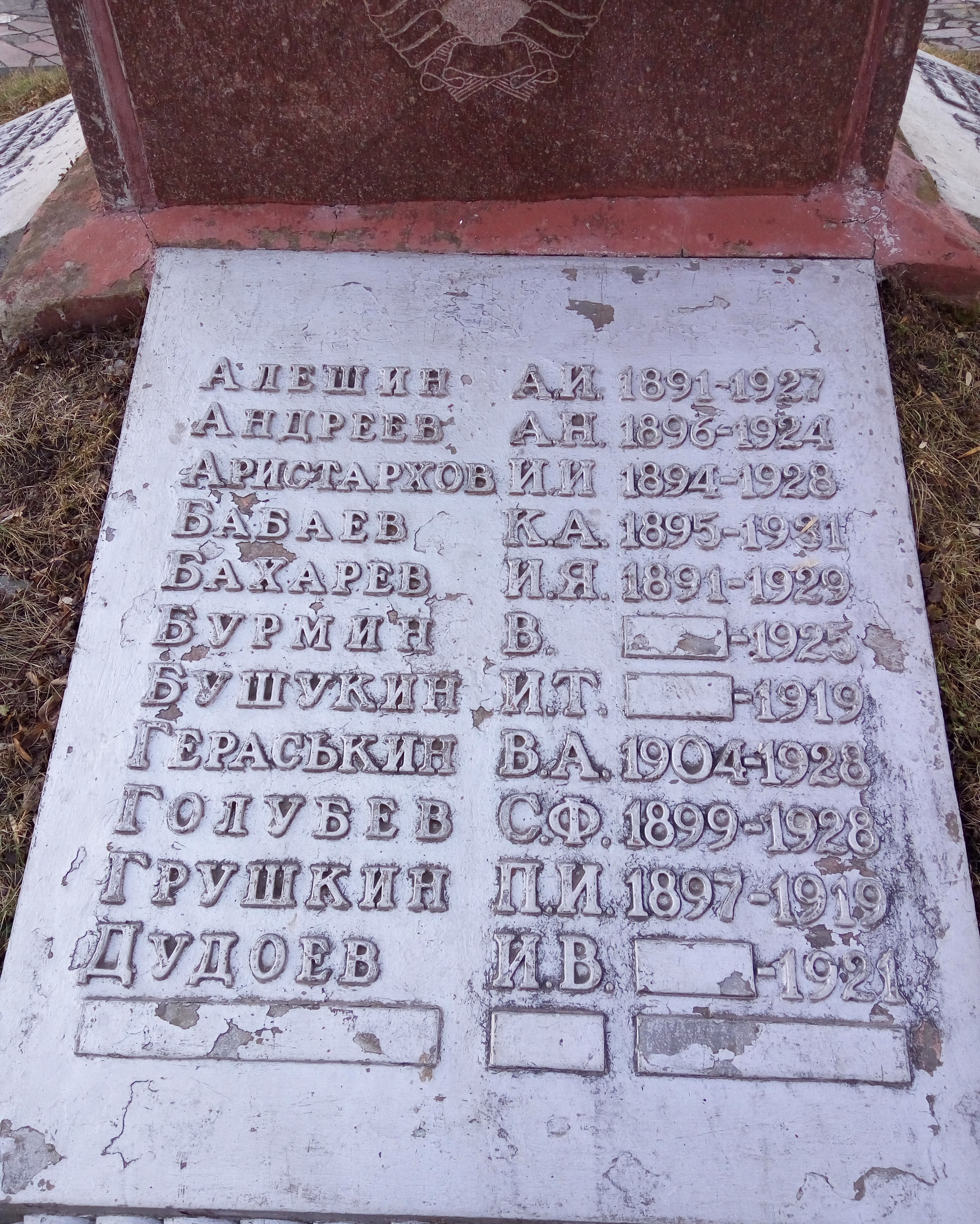 Стела героям гражданской войны 1917-1918 годов (Рязань), бронзовая плита с именами захороненных на Братском кладбище